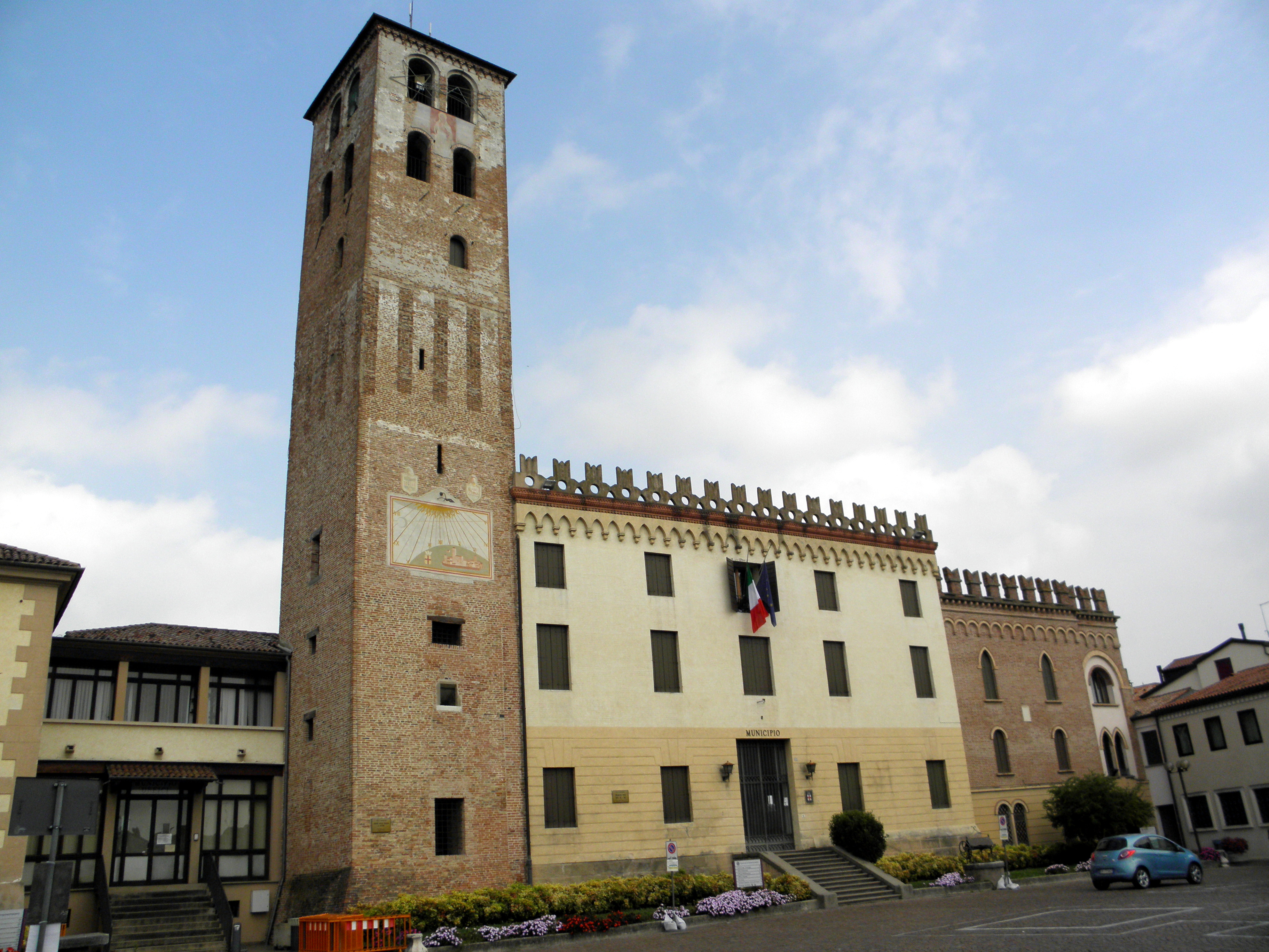 Camposampiero: Torre della Rocca e Palazzo Tiso, sede municipale.